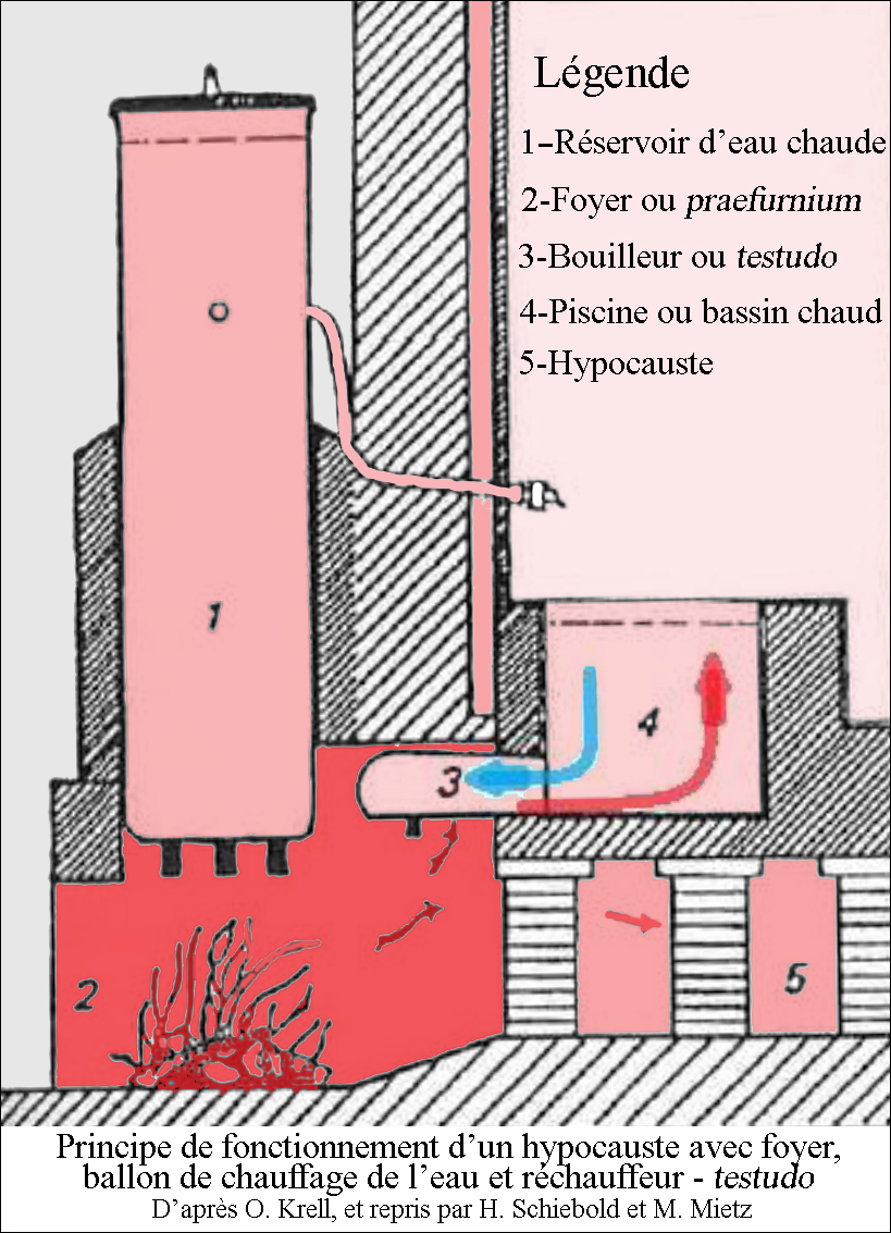 Schéma de principe de production de chaleur des thermes. avec le système du testudo.